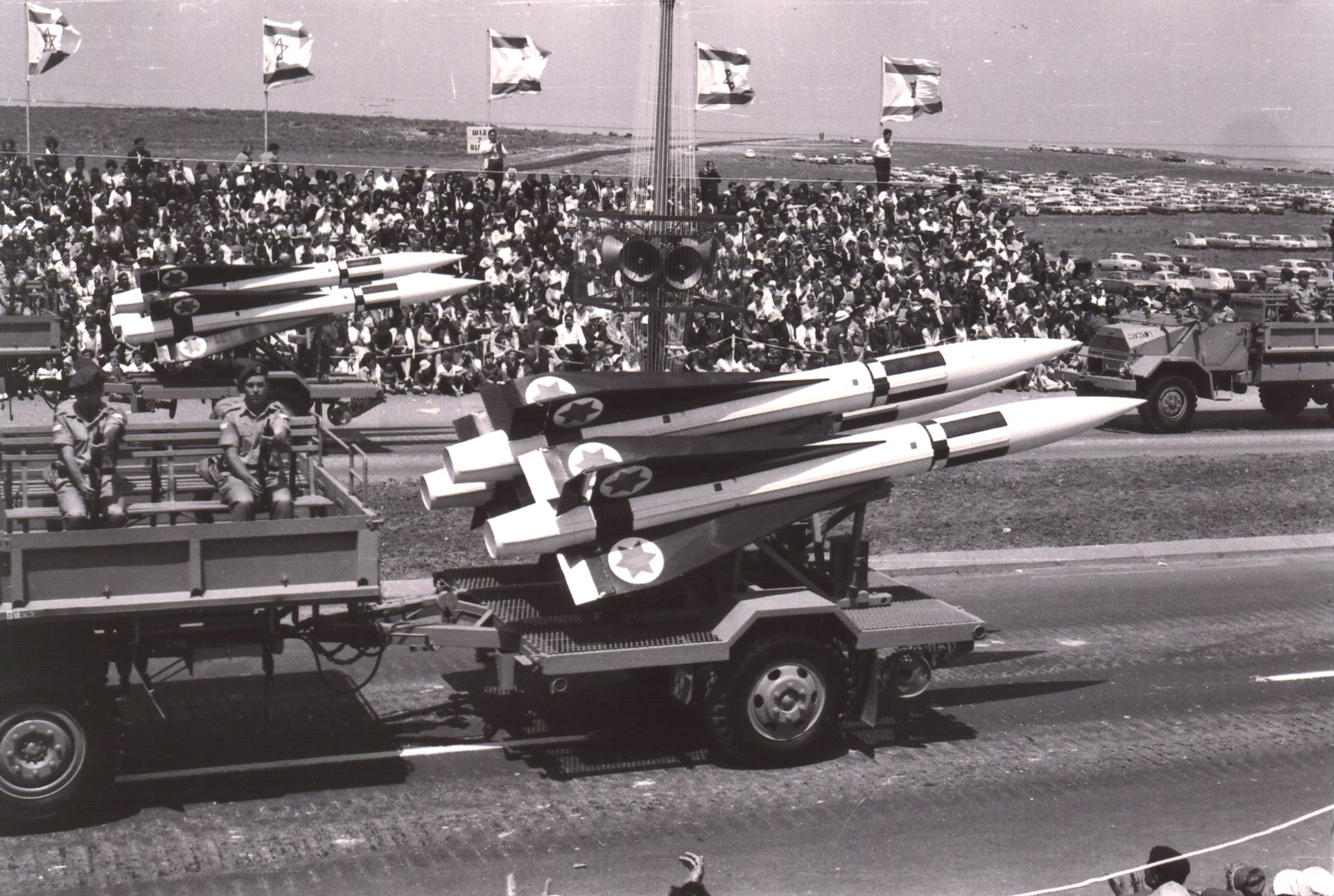 MiM-23 Hawk AA missiles in Tel-Aviv in an I.D.F. parade in 1965.טילי הוק מוצגים במצעד צה"ל בתל אביב, 1965